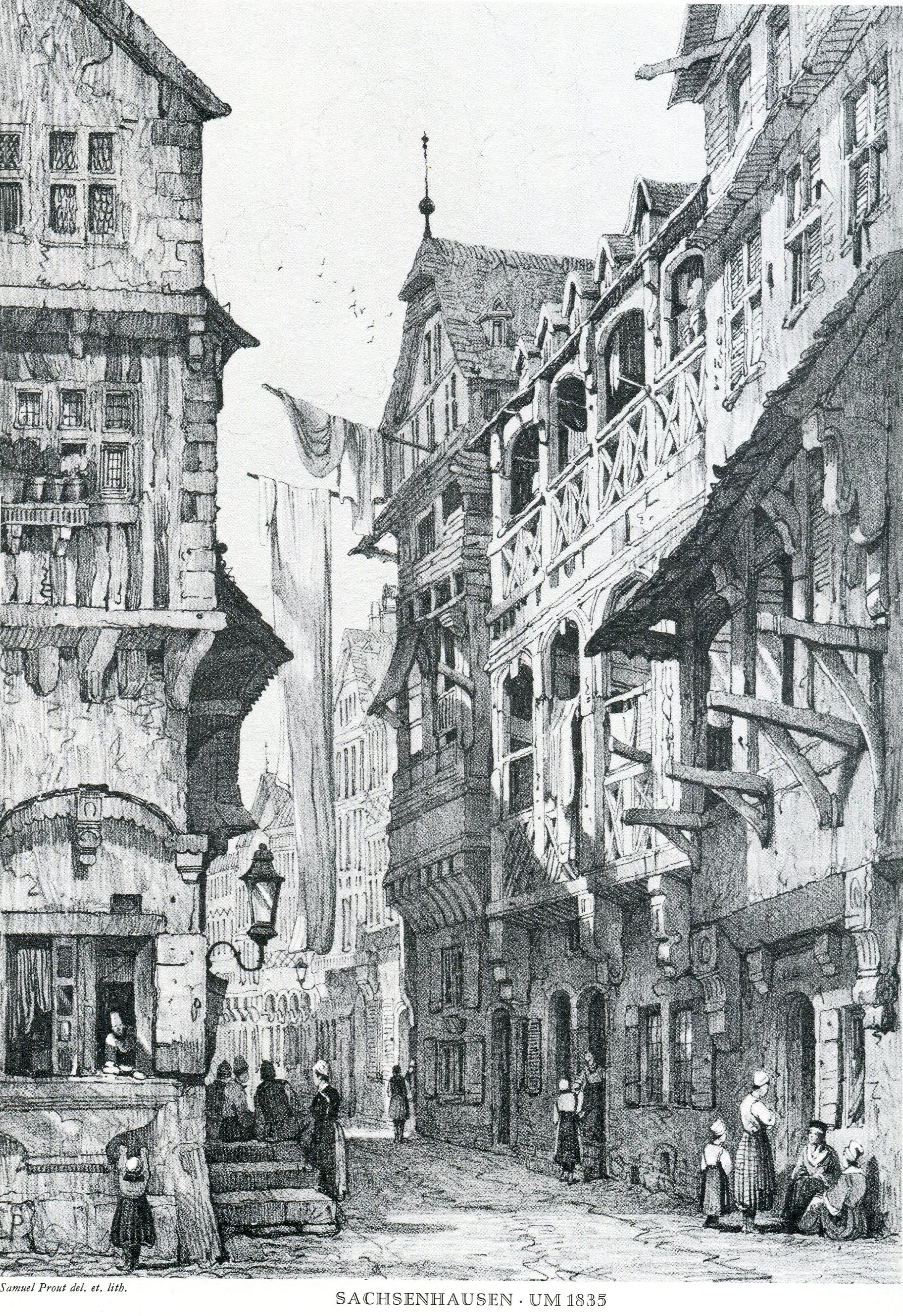 Frankfurt-Sachsenhausen - Steindruck von Samuel Prout.